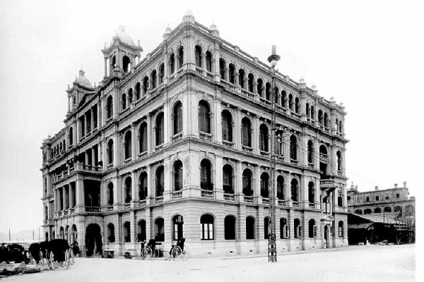 1900年代的香港會